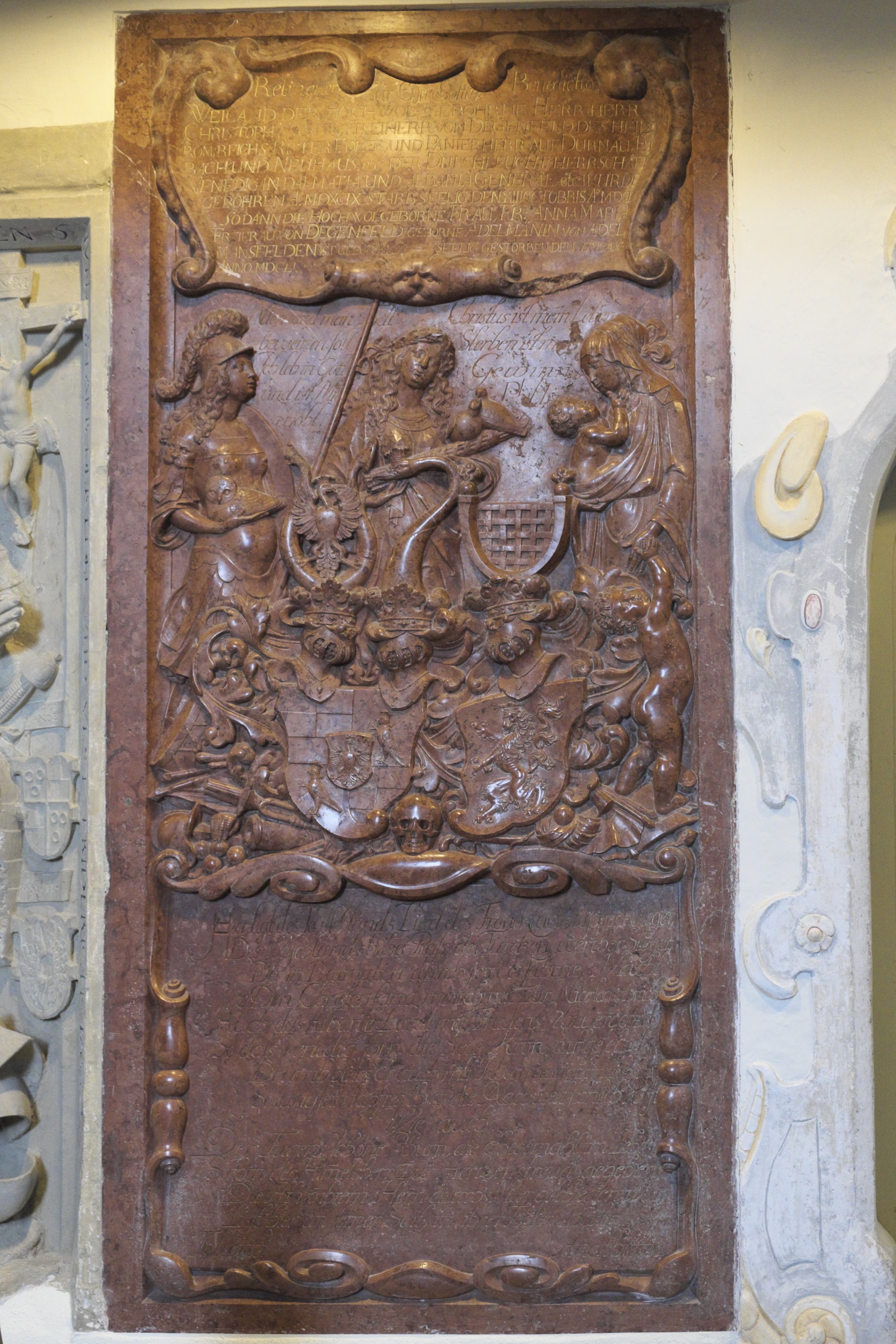 Evangelische Kirche St. Cyriakus und St. Kilian in Dürnau im Landkreis Göppingen (Baden-Württemberg/Deutschland), Grabdenkmal von Christoph Martin von Degenfeld (1599-1653)